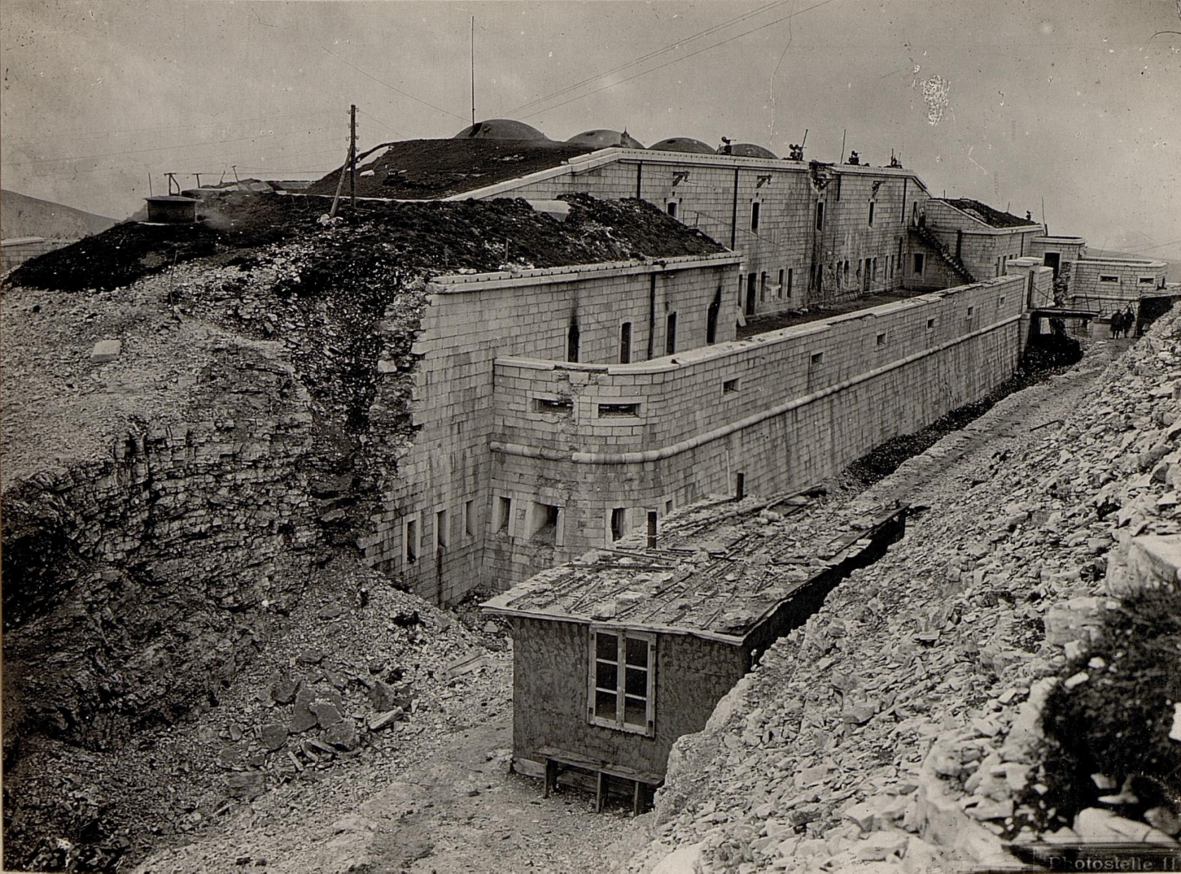 Monte Lisser .Werk Lisser.